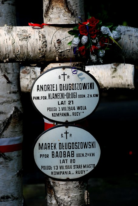 Andrzej Długoszowski, Powązki wojskowe w Warszawie